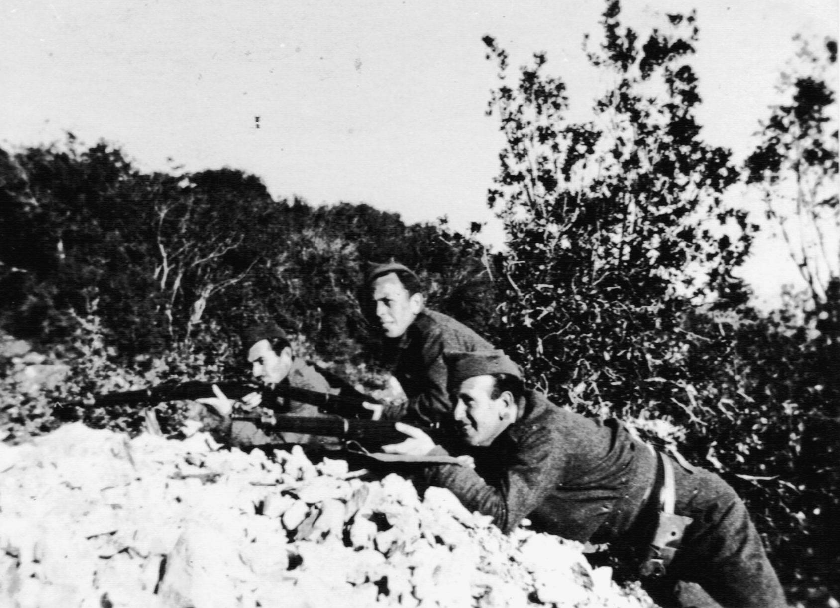 Mishmar Hacarmel was a temporary settlement point. It was established in 1939 in the east of today's Haifa University. משמר הכרמל היתה נקודת התיישבות זמנית שהוקמה בשנת 1939 באזור ממזרח לאוניברסיטת חיפה של היום שהיה מיועד לבניית שכונת מגורים. נקודת ההתיישבות הוקמה במטרה לשמור את האזור מפני ניסיונות לנצלו למטרות עיבוד על ידי תושבי האזור. תמונה של שלושה ממתיישבי משמר הכרמל שעסקו גם בשמירה על המקום. מימין פטר בלוג, במרכז, פריצי פרידמן, משמאל אלכס וסלי הצילום התקבל מבנו של פטר בלוג- מישי בלוג